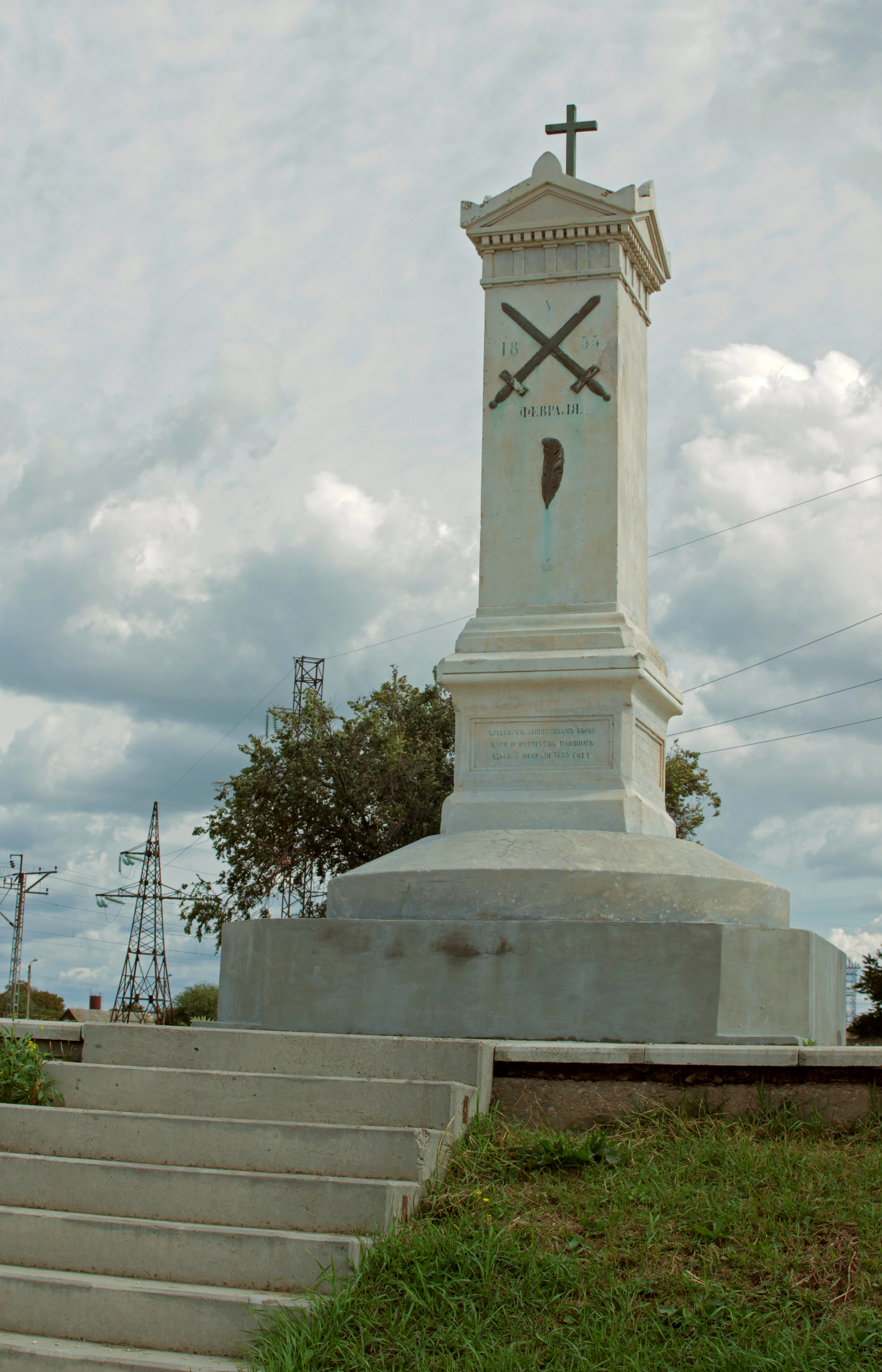 Пам'ятник на братській могилі російських воїнів, Євпаторія, вул. 2-ї Гвардійської Армії/вул. Ескадронна